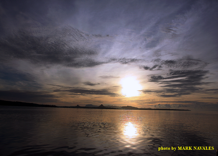 Sunrise view in Panglima Sugala, Tawi-Tawi